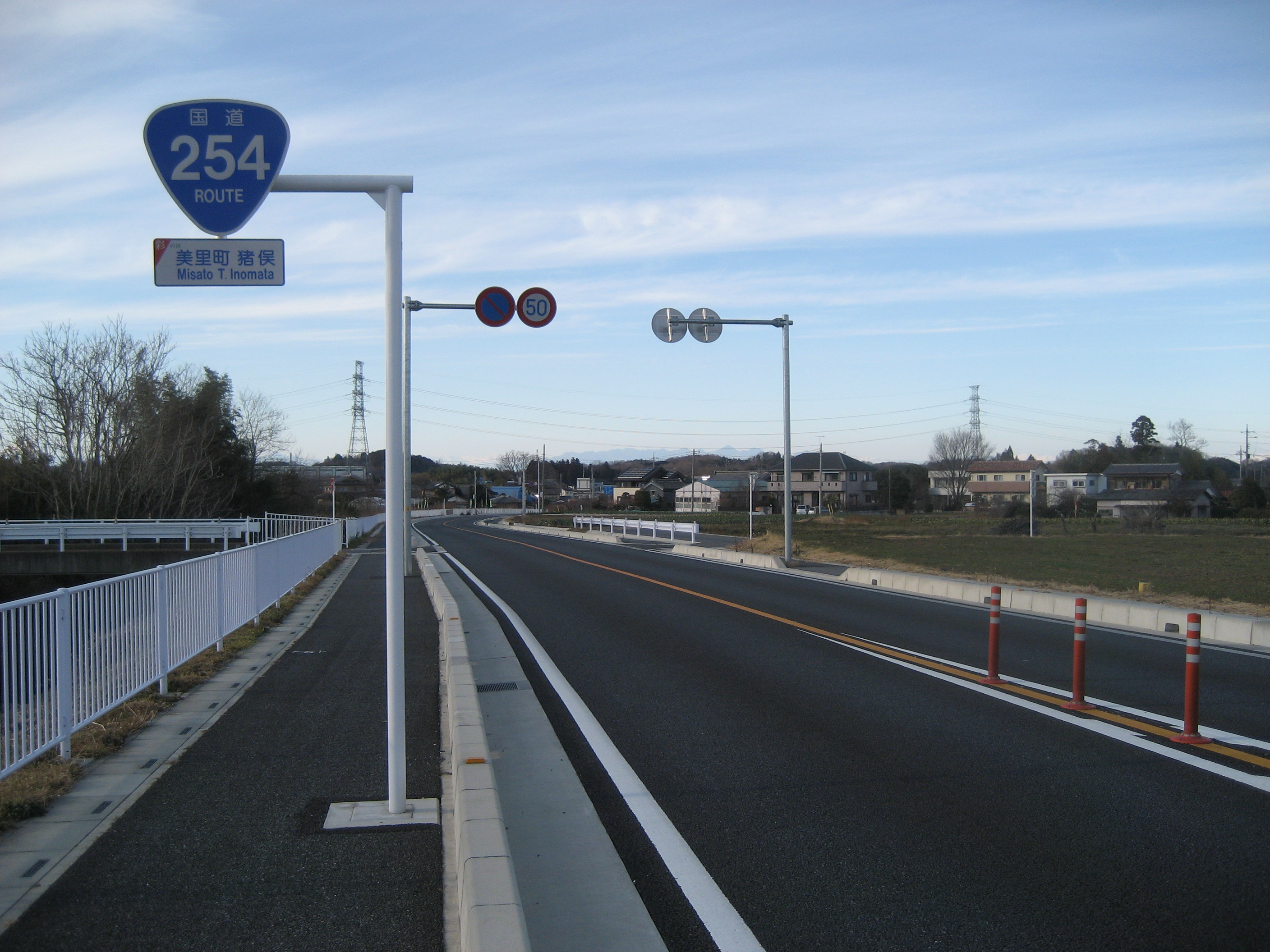 国道254号線猪俣バイパス（埼玉県美里町猪俣）